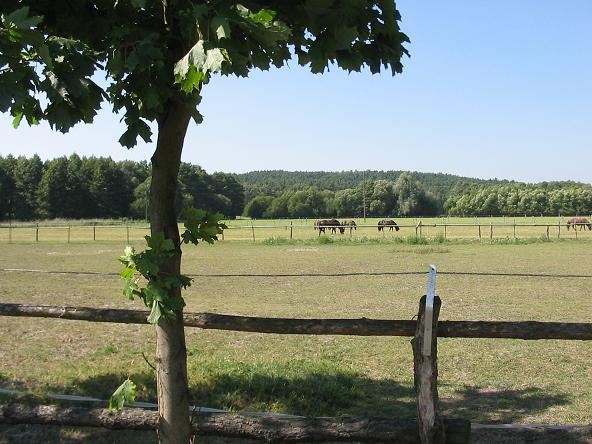 Mietgendorf, Brandenburg Östlicher Ausläufer des Höhenzuges Glauer Berge (knapp 93 Meter) im Hintergrund Selbst fotografiert, August 2004